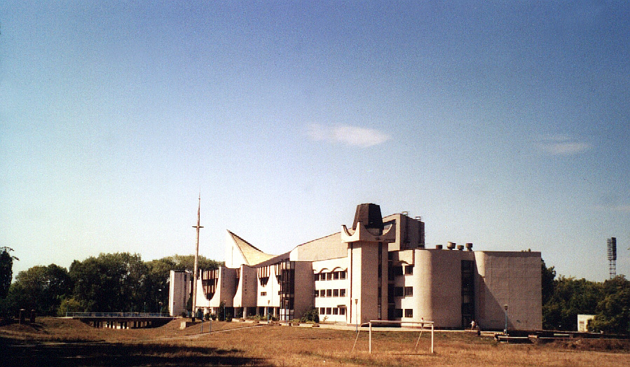 Uzhhorod, Ukraine, Culture and sports center date: August 2003 author: Richard Seefeld (published under PD in the German Wikipedia) Kultur- und Sportzentrum in Uschhorod 2003 selbst fotografiert im August 2003. Fotograf: Richard Seefeld Freigegeben für jeden und alles, sowie gemeinfrei und nach GNU-FDL